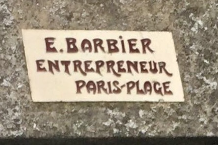 plaque apposée sur le bâtiment nouvellement construit.